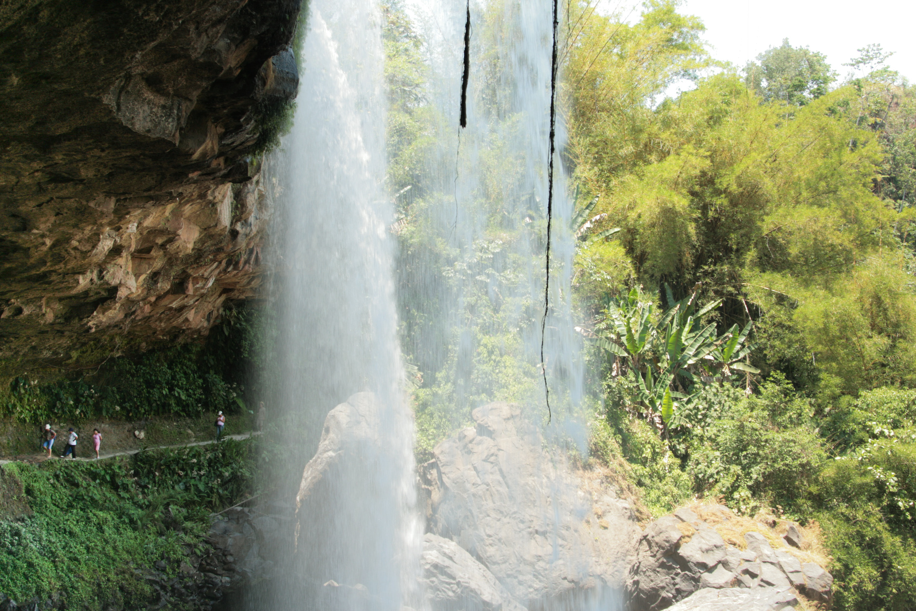 Cascada Plan de Guinea, en Ayotoxco, Puebla